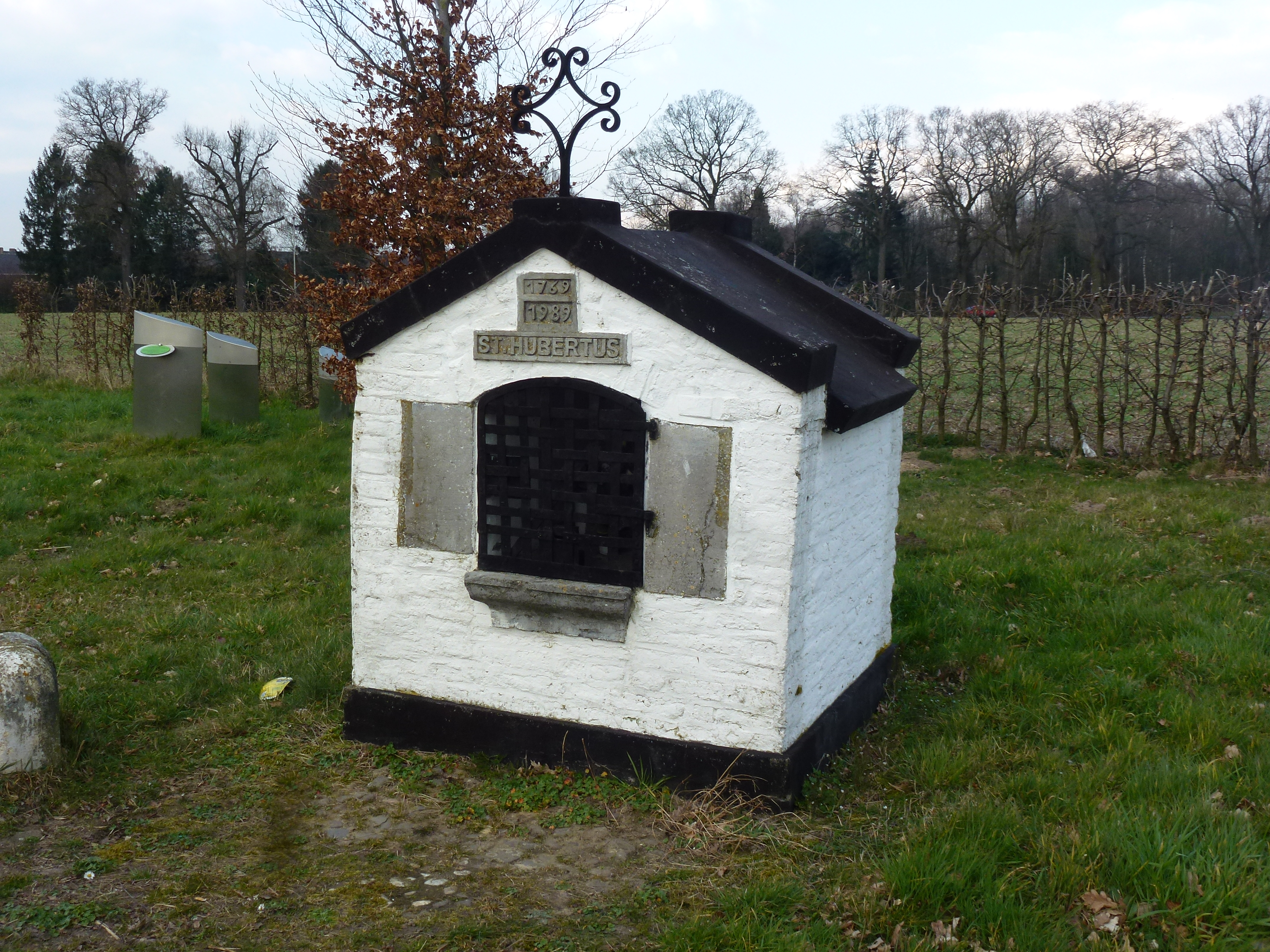 Wegkapelletje H. Hubertus, Thorn